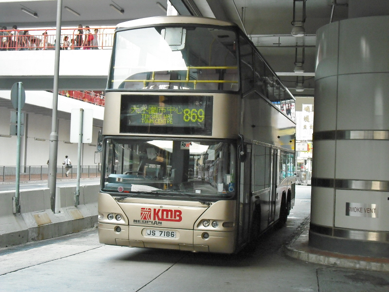 九巴869線巴士，在荃灣站巴士總站等候前往沙田馬場